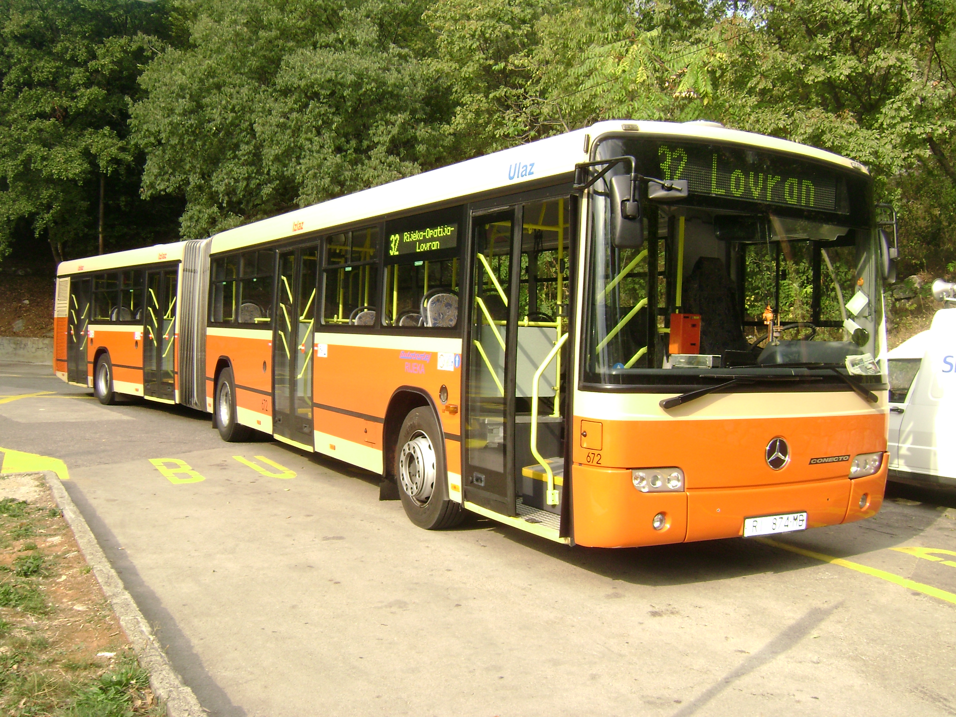 Zglobni autobus "Autotroleja" marke MB Conecto G u Lovranu.